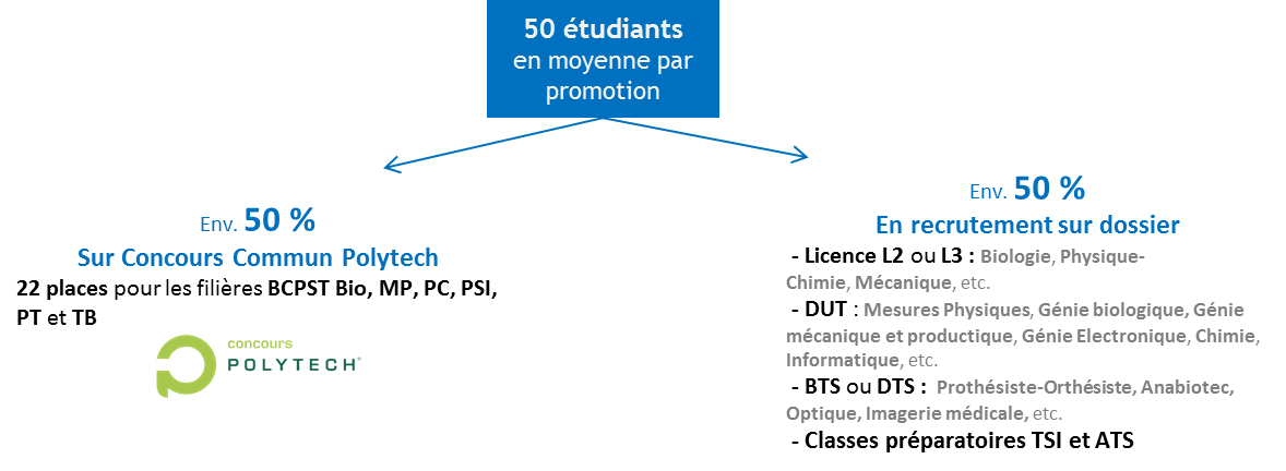 Diagramme présentant les 2 moyens de recrutement à l'ISIFC.